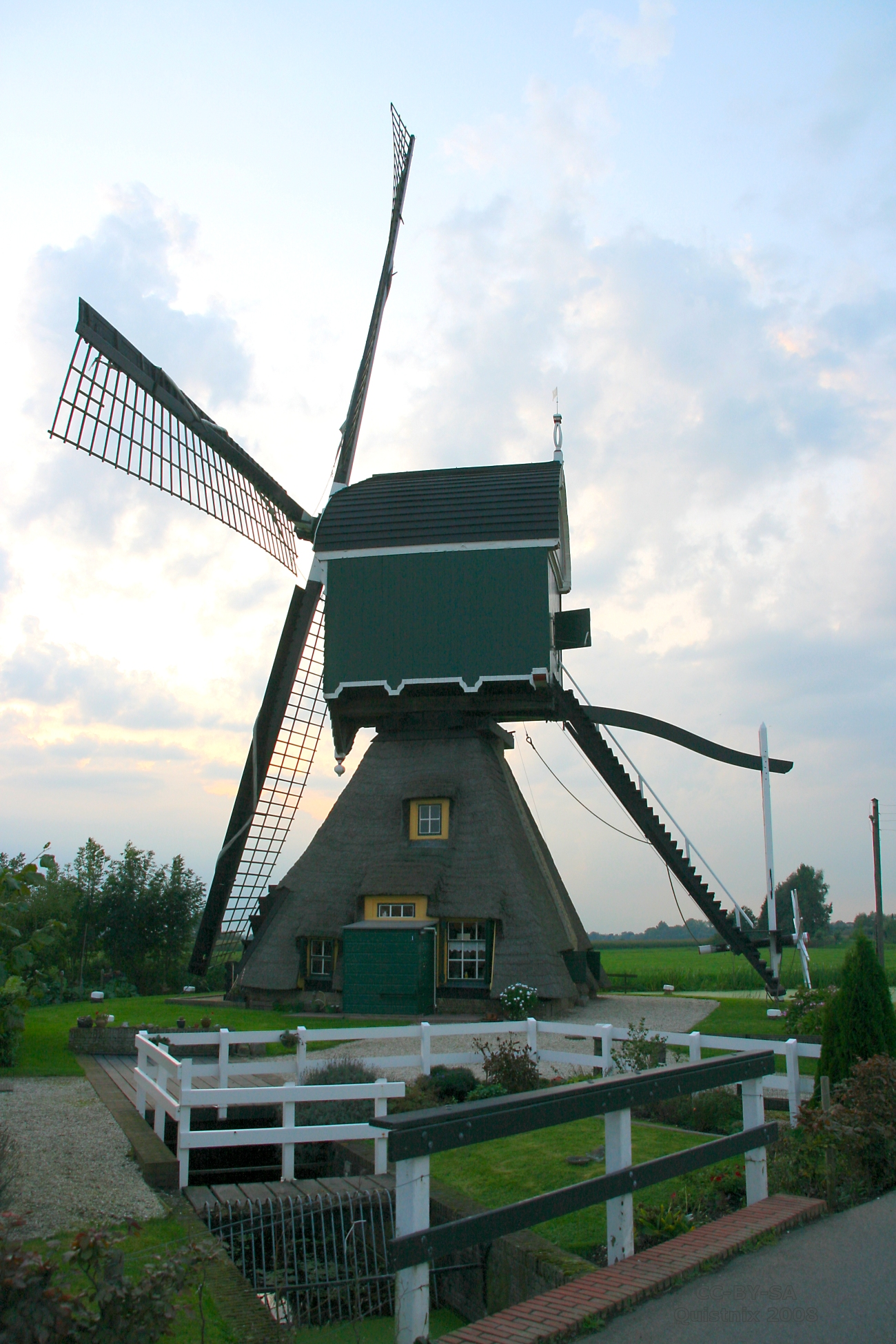 Vlist: Molen Bonrepas